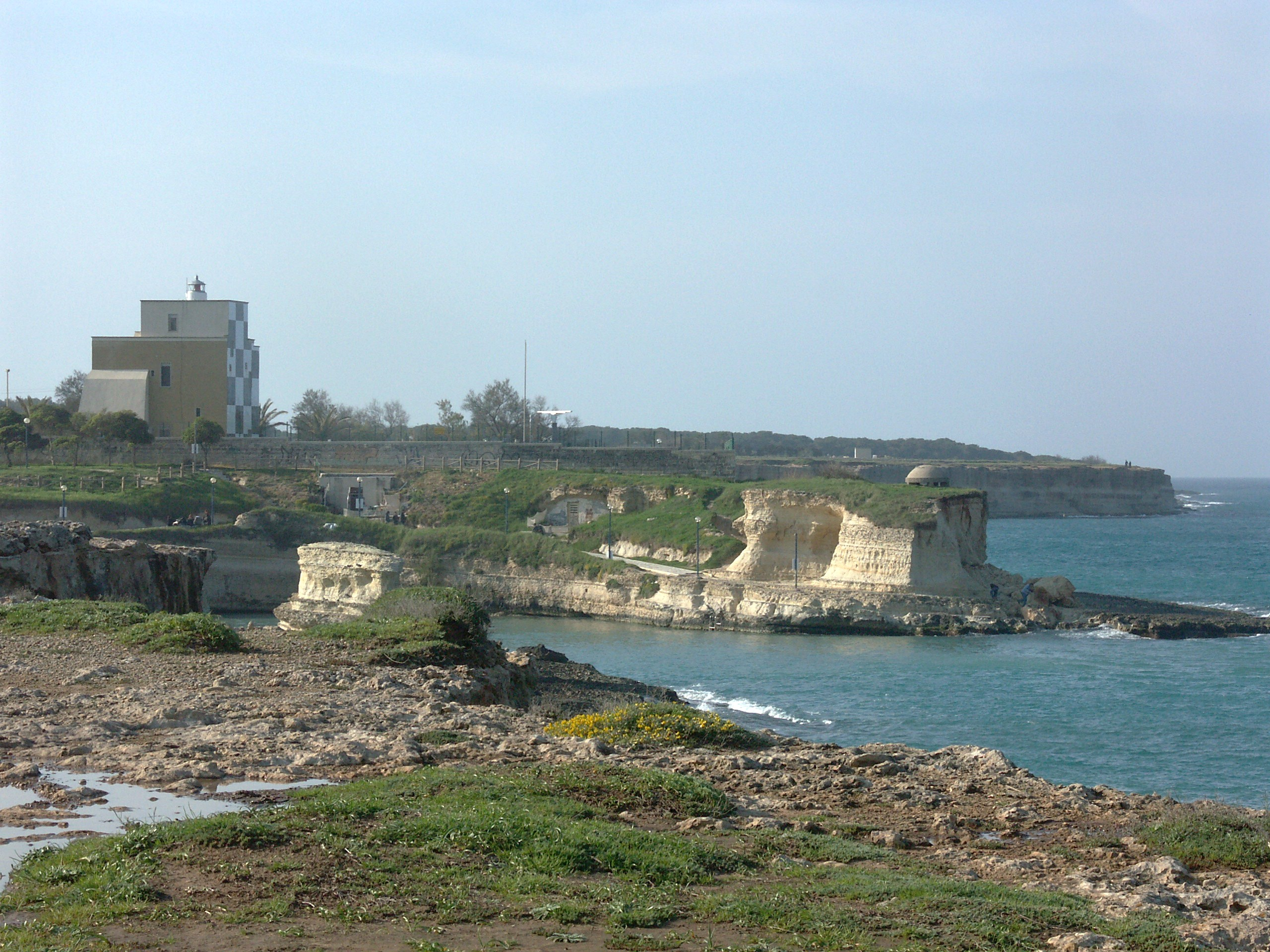 Torre Sant'Andrea: Leuchtturm